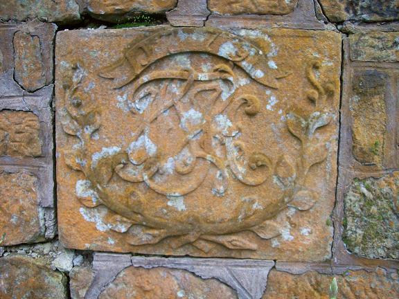 Initialstein 1779 ehem. Fürstenhaus Grillenburg